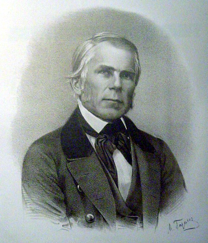 Wojciech Jastrzębowski (1799-1882)